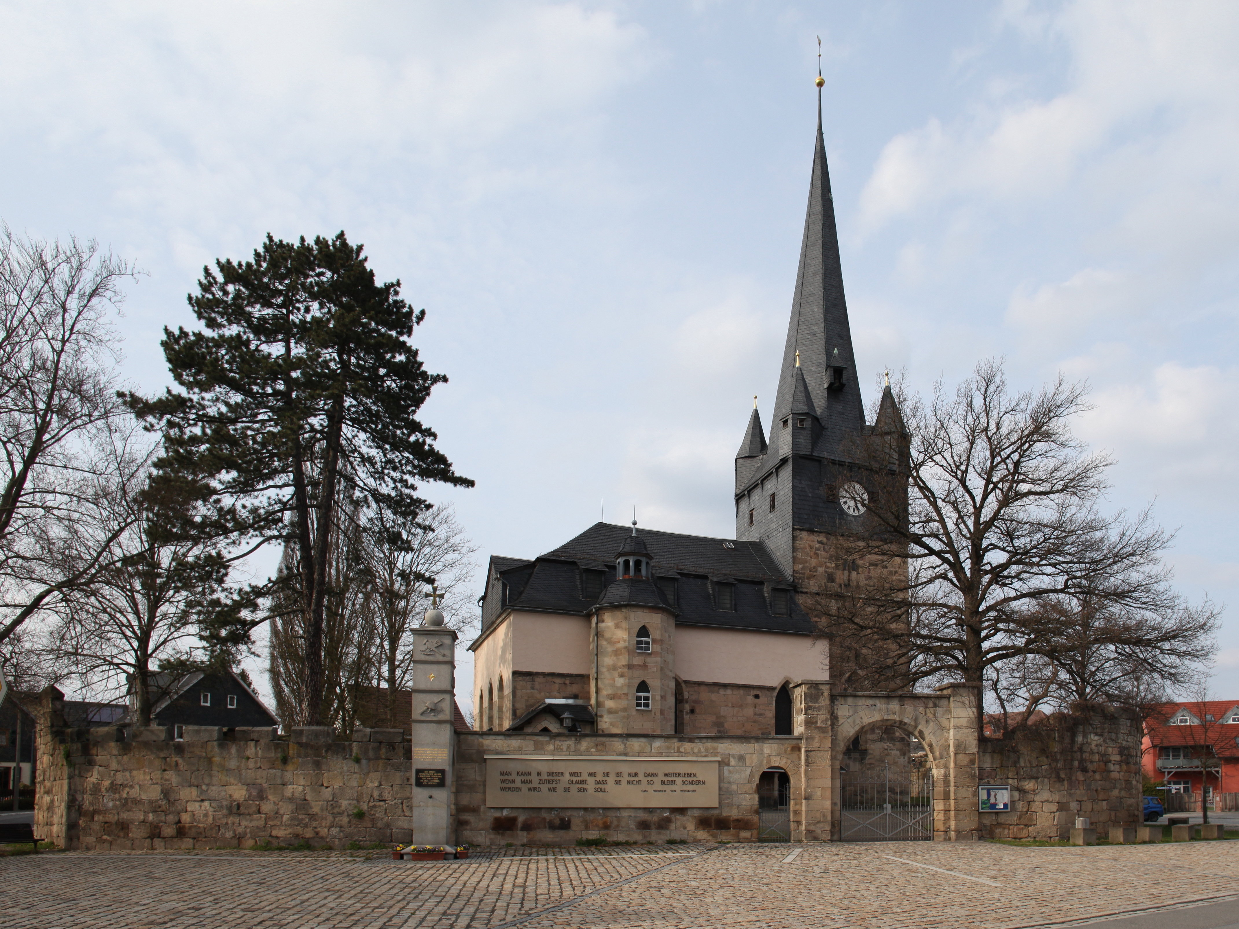 Ev.-luth. Kirche St. Aegidien in Oberlind, OT von Sonneberg, in Thüringen